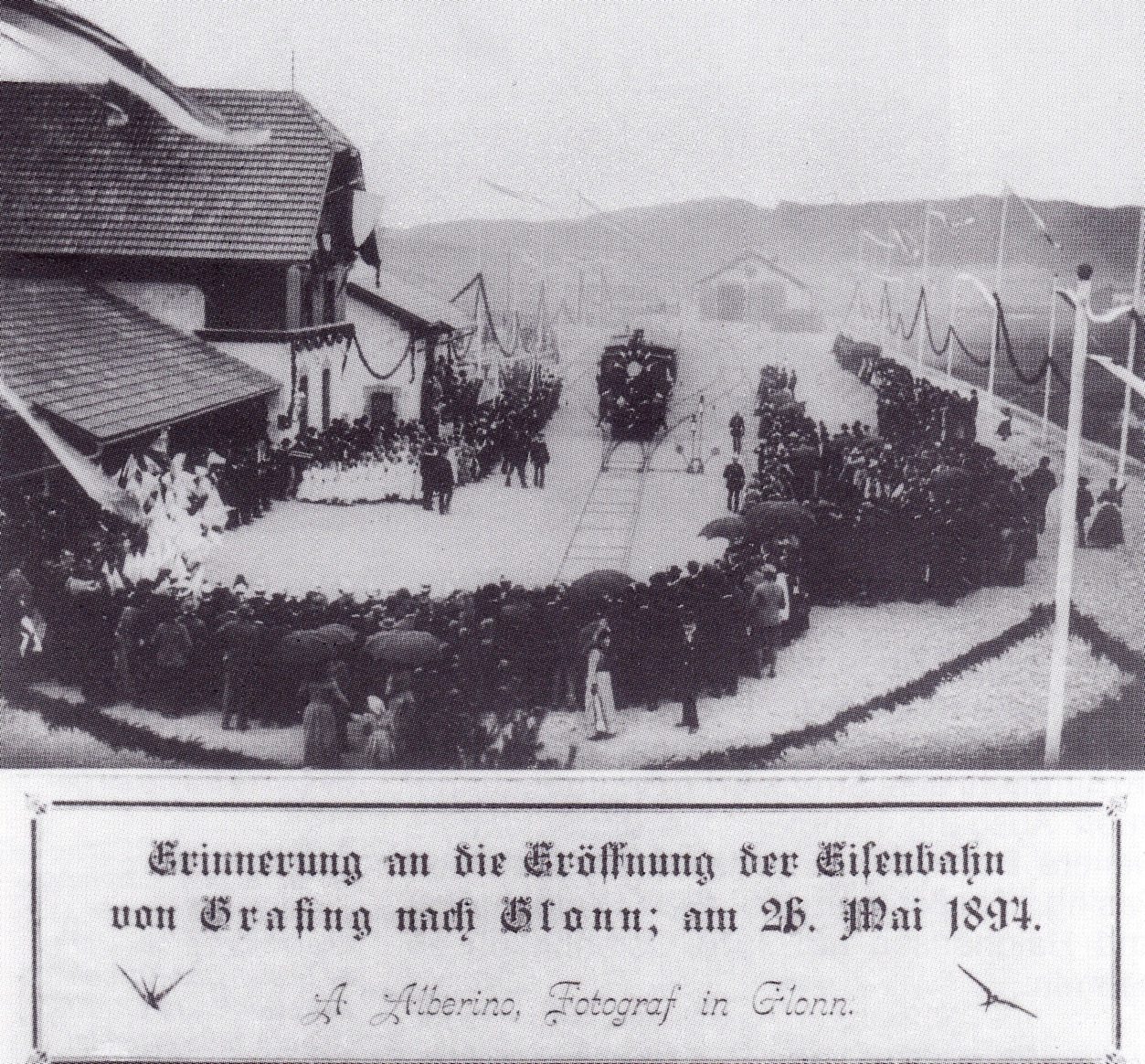 feierliche Eröffnung der Bahnstrecke Grafing–Glonn am 26. Mai 1894, links das Empfangsgebäude des Bahnhofs Glonn, in der Mitte der Eröffnungszug, im Hintergrund der bis heute erhaltene Lokschuppen. Darstellung des Endbahnhofs Glonn in der Topogr. Karte 1:25.000 von 1931-1941 auf BayernAtlas